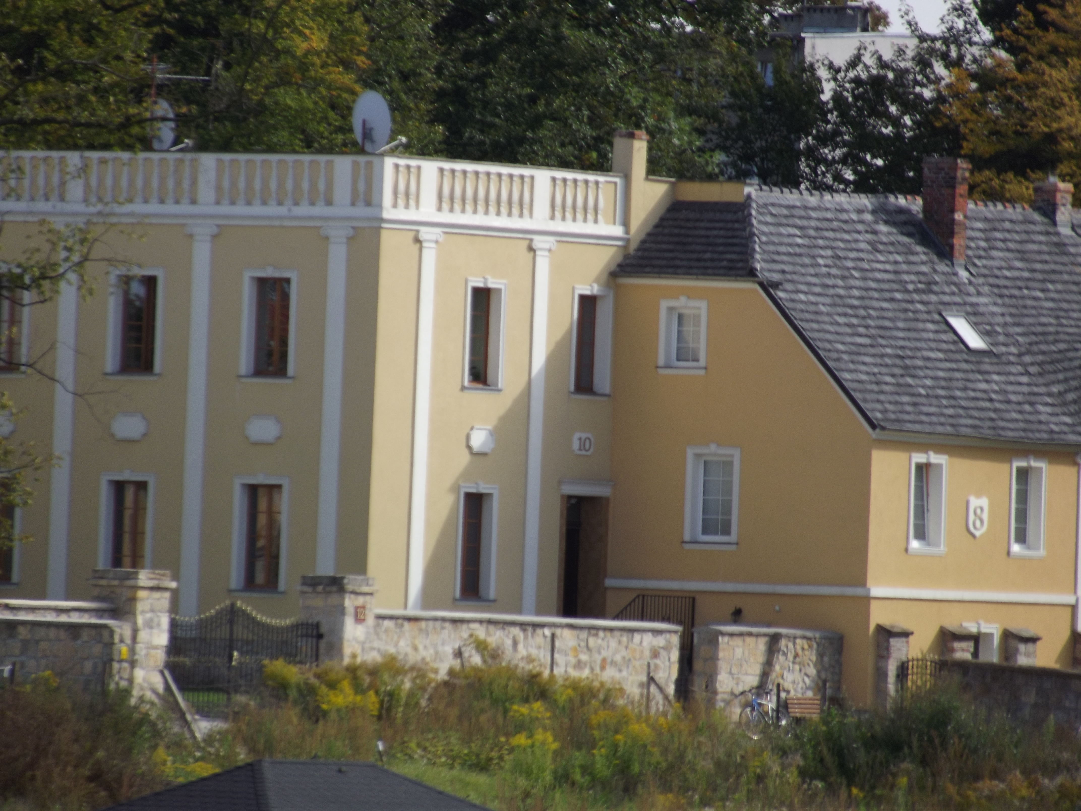 Pałac z XVIII wieku w Kruszynie, gmina Bolesławiec 11.1968.